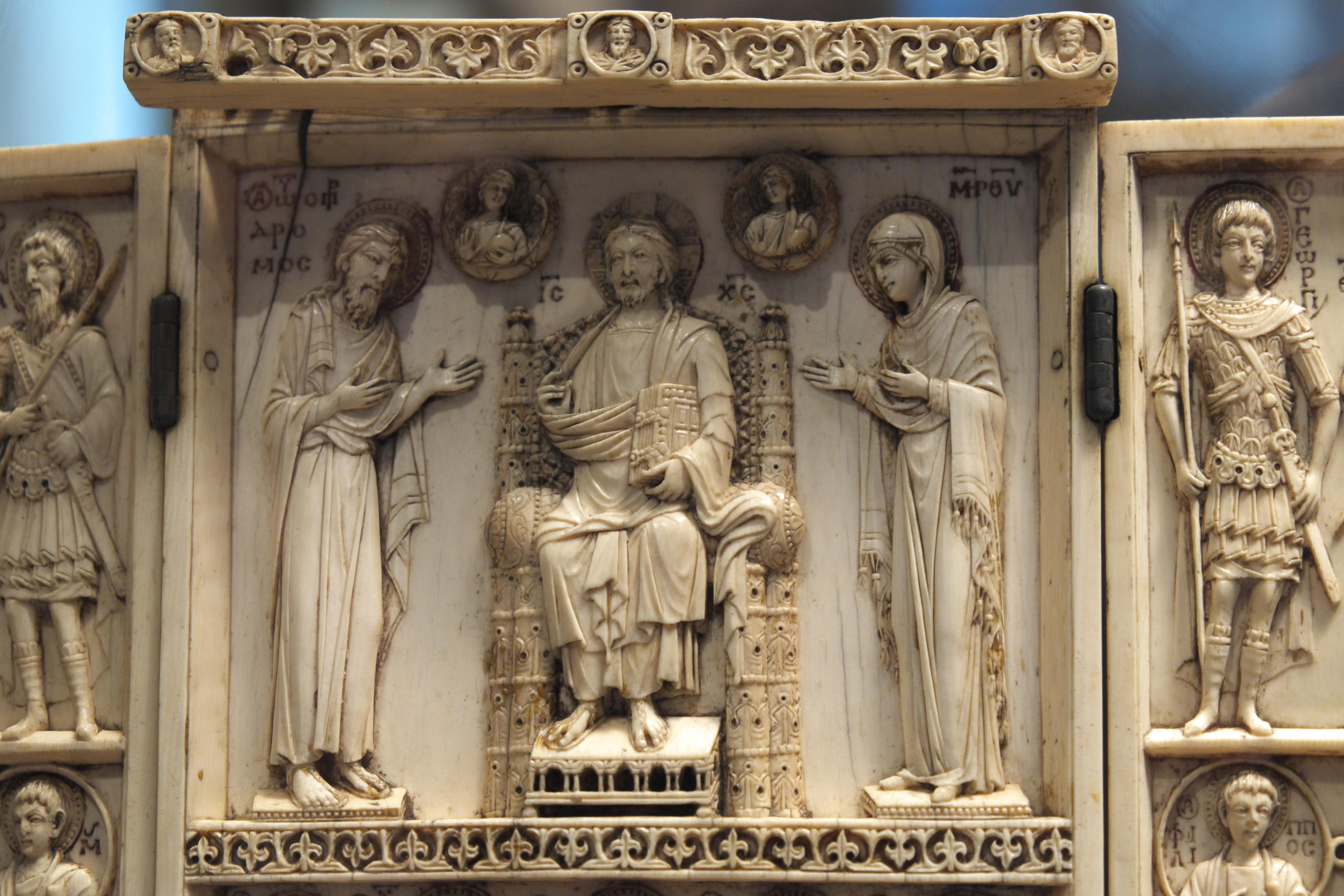 Harbaville-Triptychon im Musée du Louvre in Paris, aus der Mitte des 10. Jahrhunderts, Vorderseite (Ausschnitt), Darstellung: Jesus, Maria und Johannes ( Triptyque Harbaville)